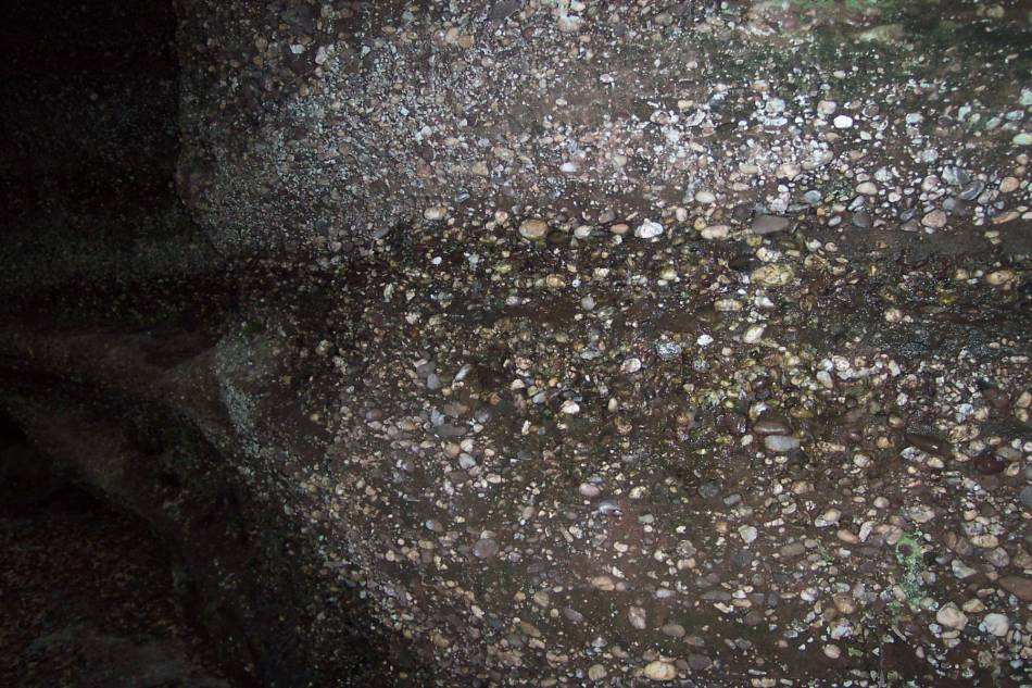 Détail d'un "poudingue" des roches gréseuses de la région de Dabo en Lorraine.